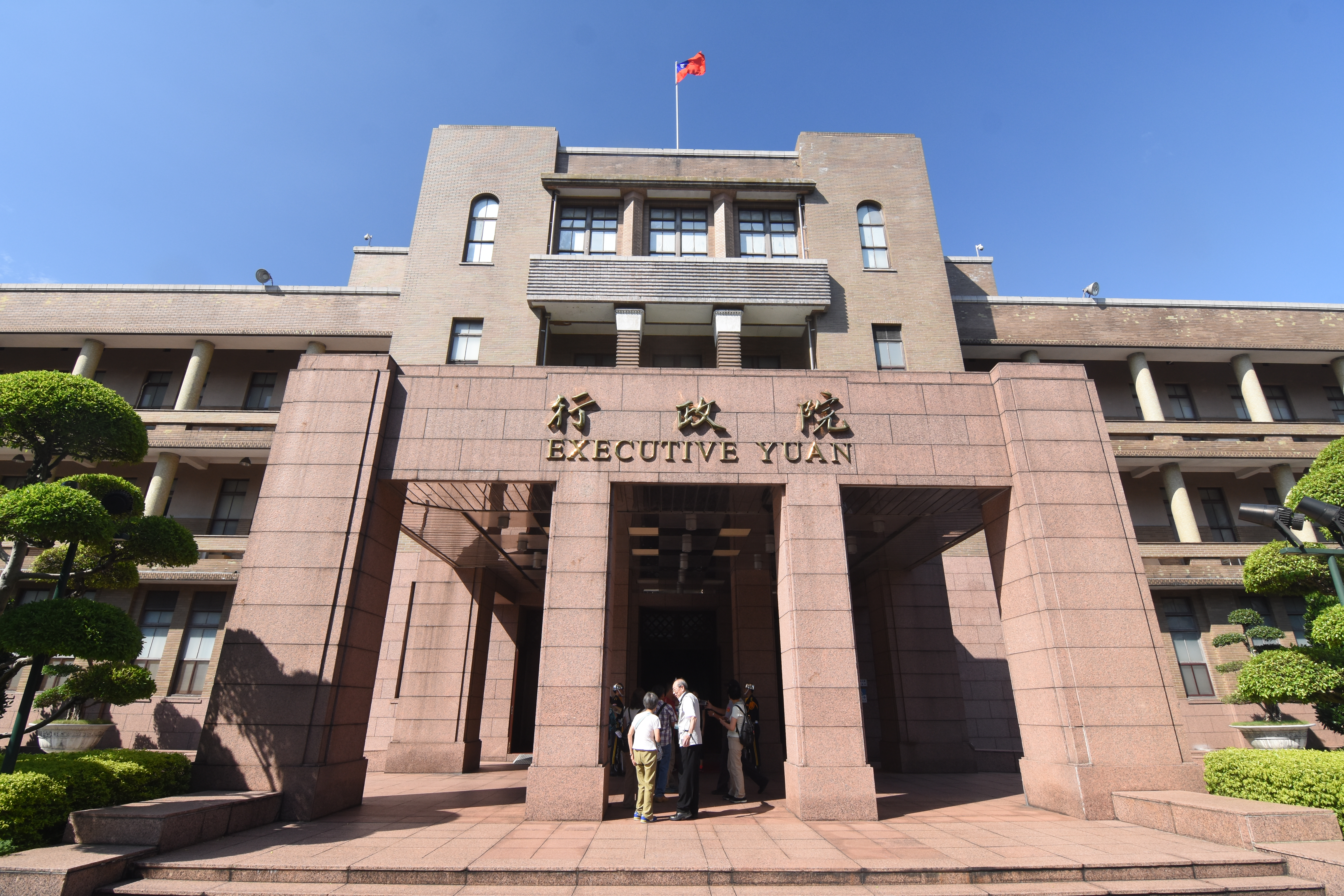 行政院大廈古蹟日近攝